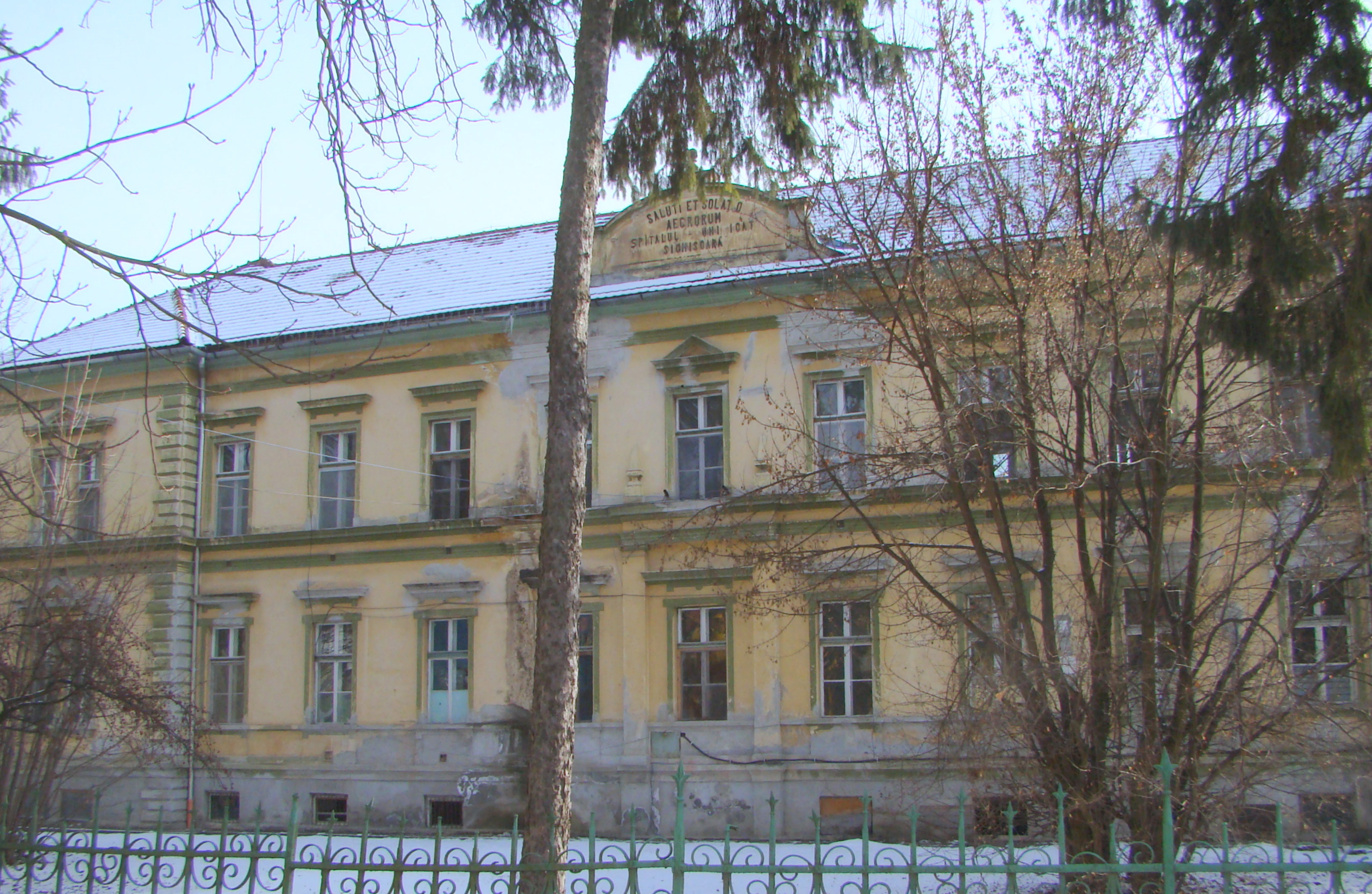 Spital, municipiul Sighișoara, str. Boiu Zaharia 29 1892 - 1896